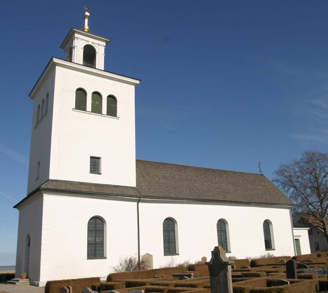 Svanshals kyrka. Foto Olof Ekström 2005.